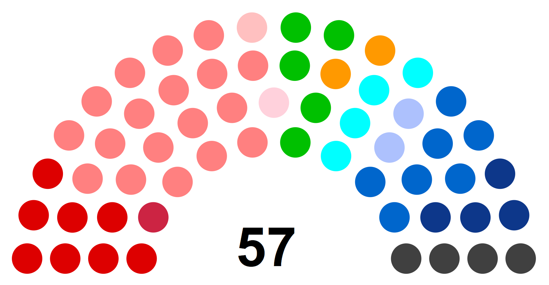 Partis politiques représentés au Conseil régional de Picardie en 2009